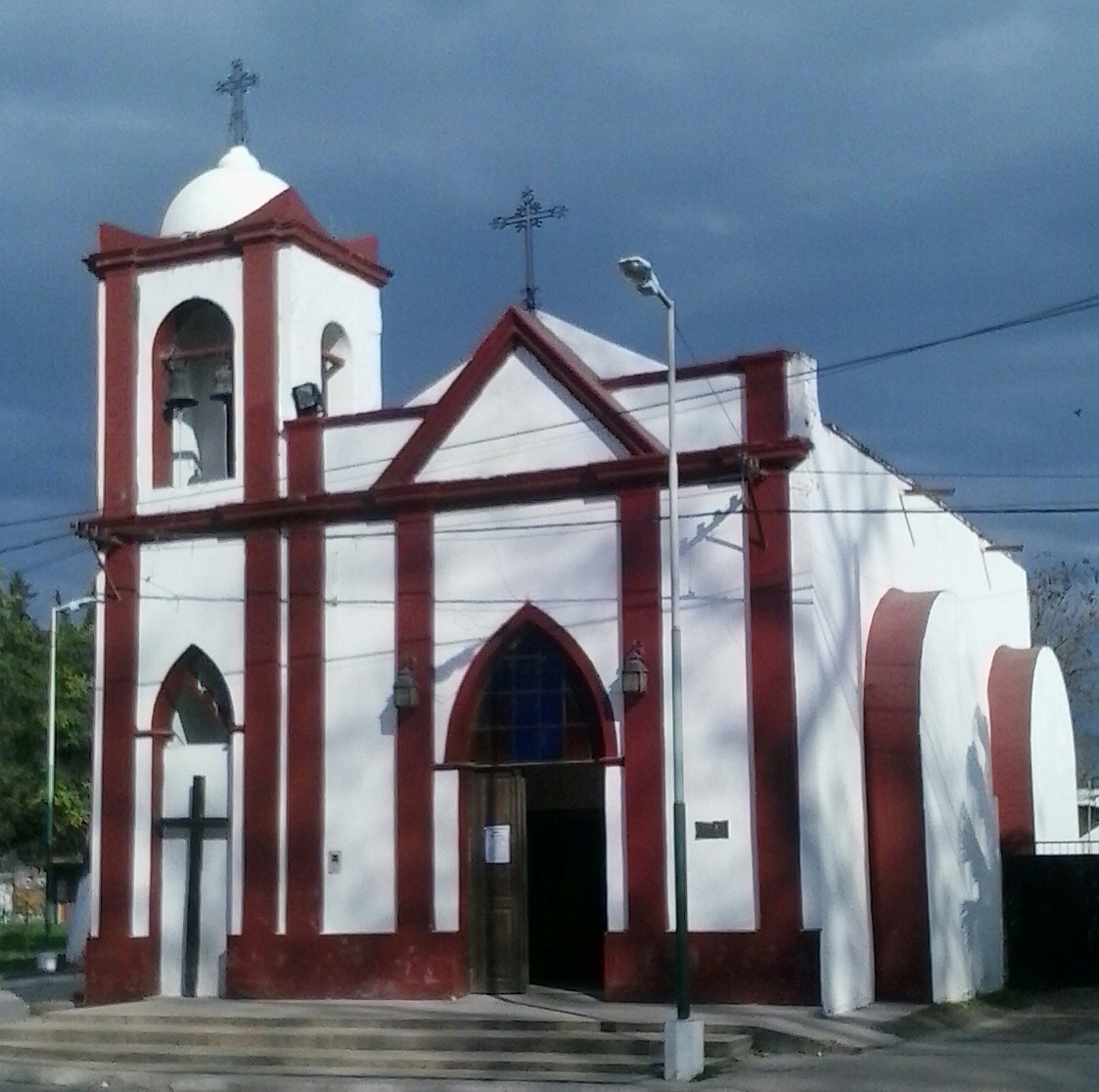 Templo que dará aproximadamente de 1863